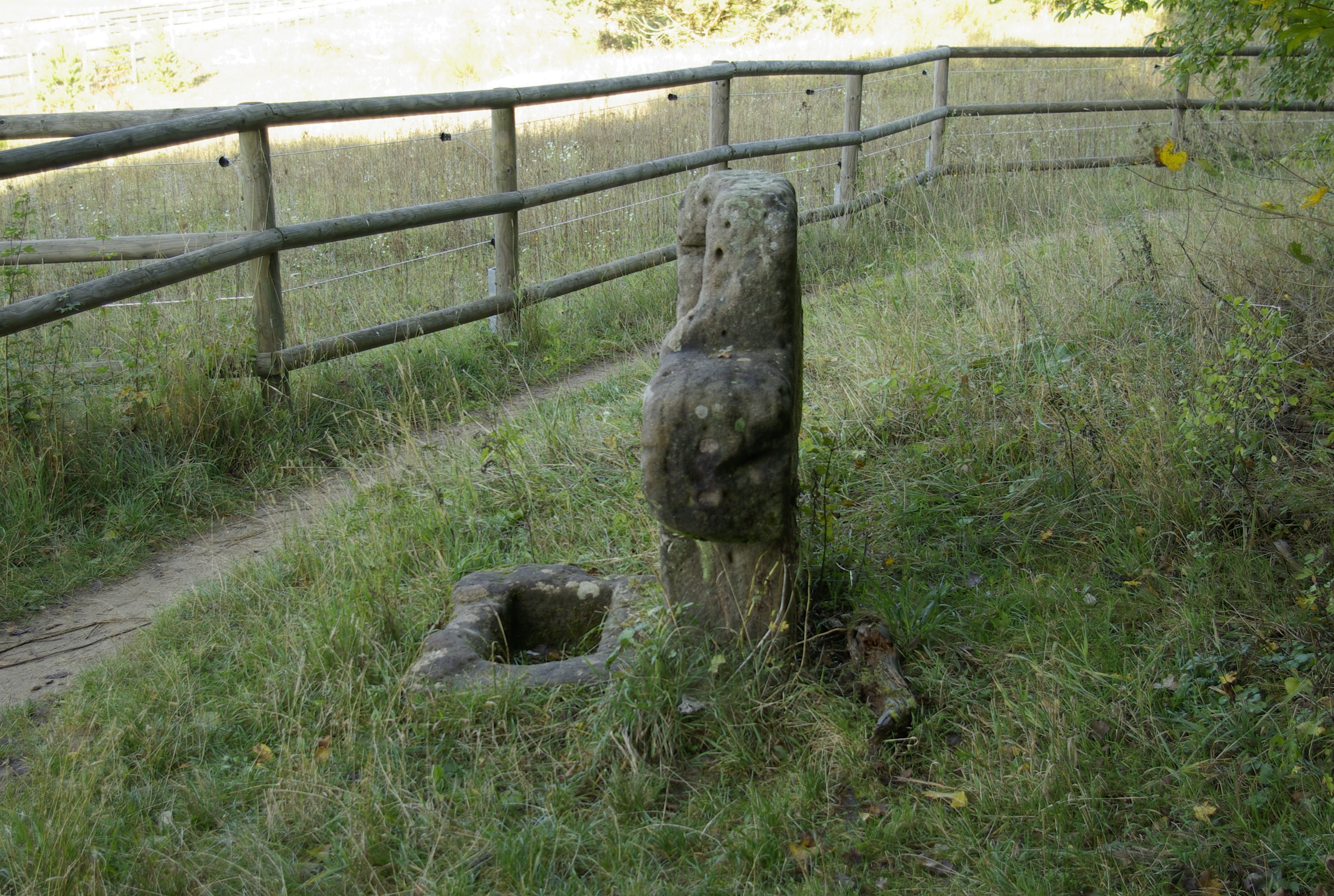 Das Weiße Kreuz, auch Hirschlecke genannt, im Tennenloher Forst im Landkreis Erlangen-Höchstadt. Nicht zu verwechseln mit der weiter nördlich befindlichen Hirschlecke im Buckenhofer Forst.